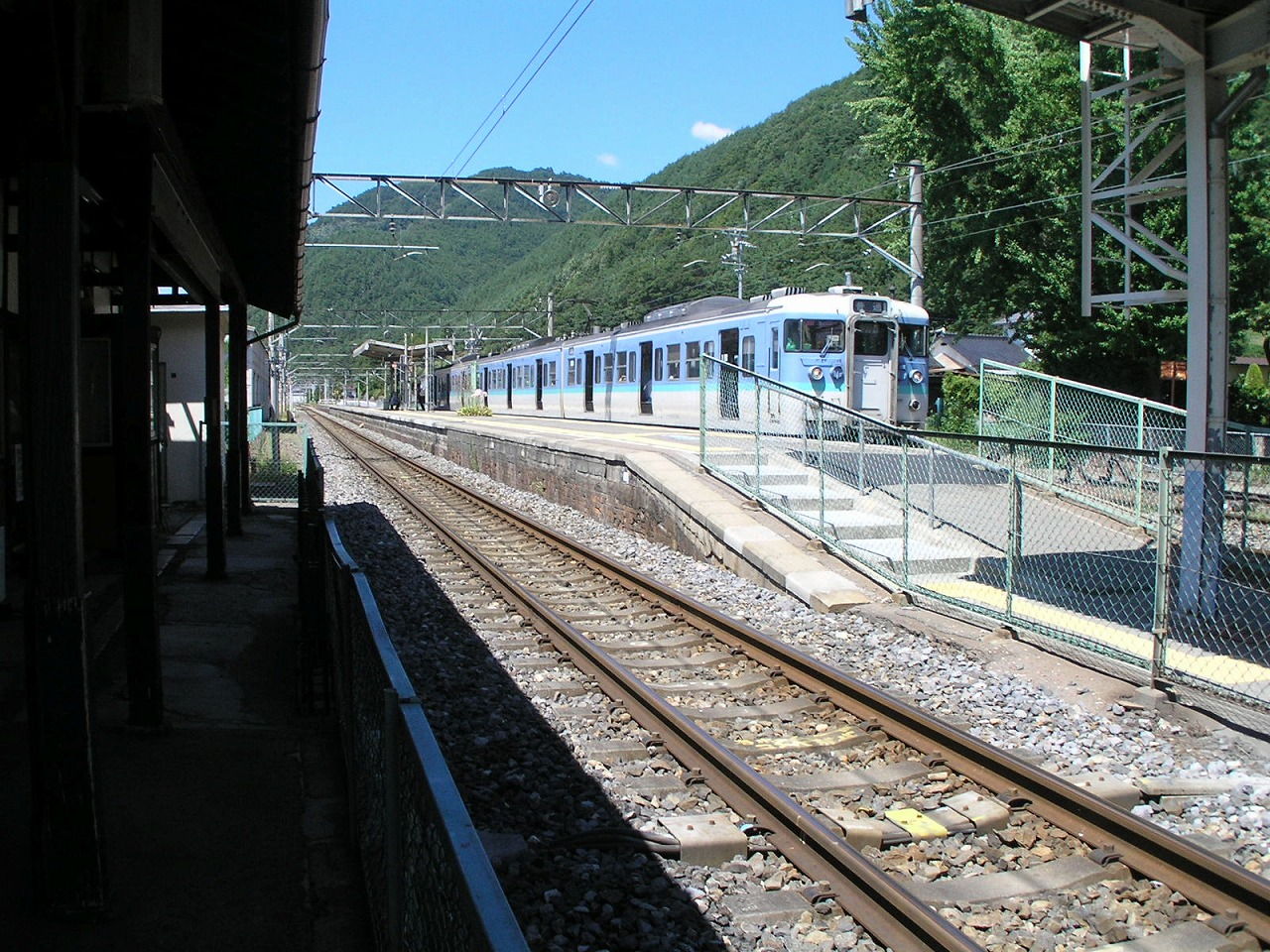 田沢駅ホーム